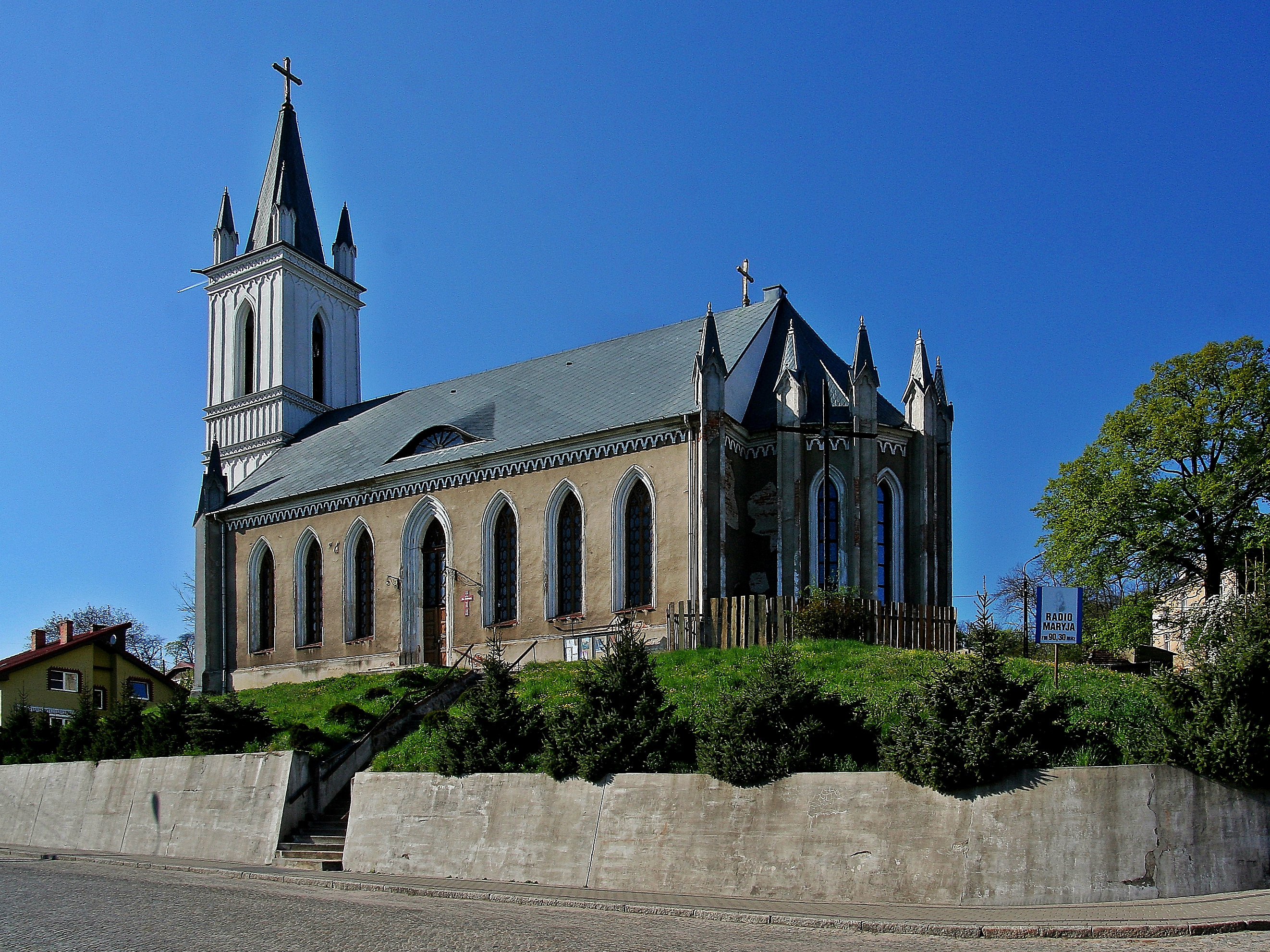 Krosno Odrzańskie - kościół p.w. św. Andrzeja, 1887